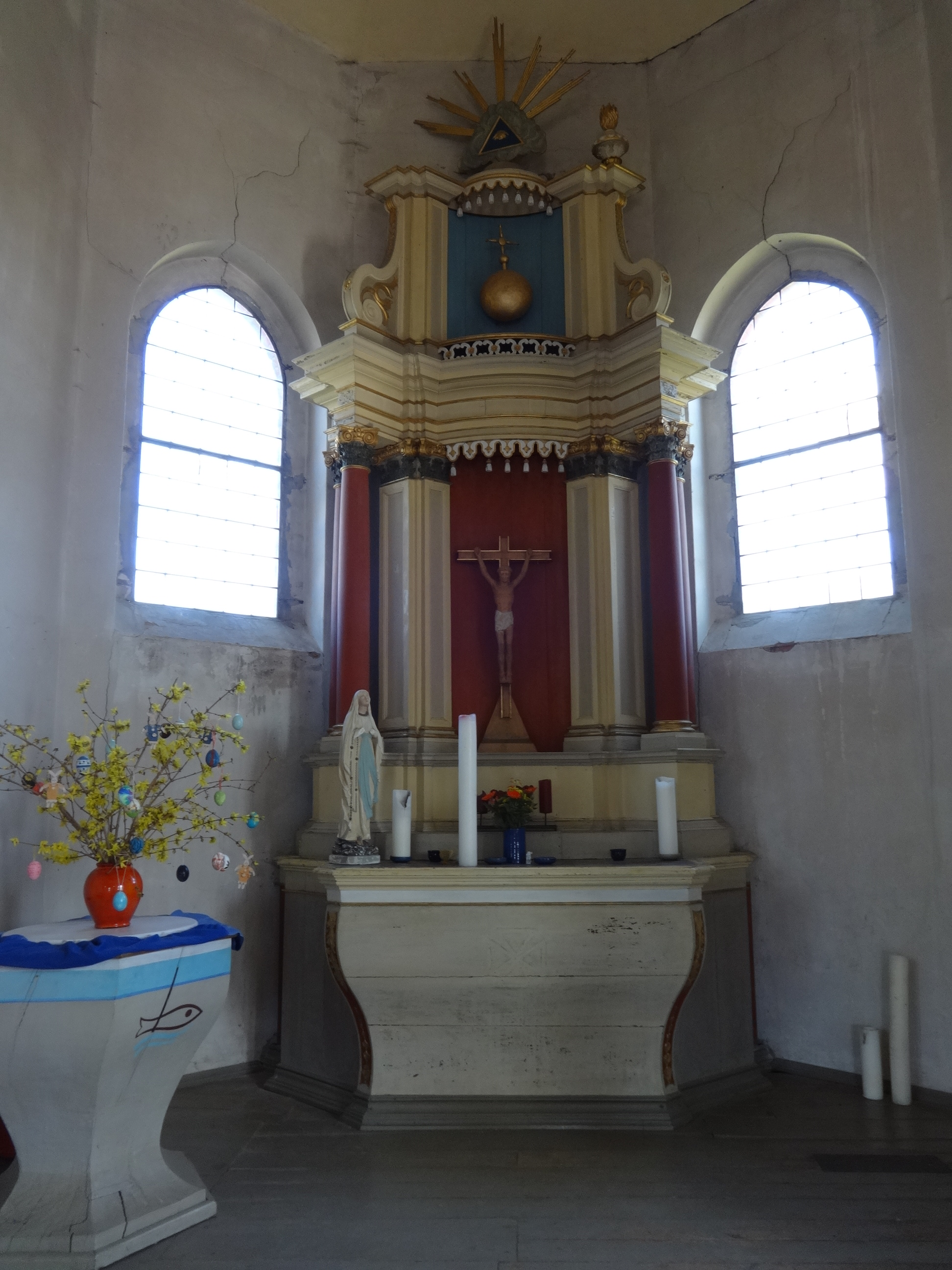 Die Gutskirche ist Bestandteil einer unter Denkmalschutz stehenden Gesamtanlage bestehend aus einem Herrenhaus mit Aulaanbau und Gästehäusern, Wirtschaftshof mit Verwalterhaus, Kuhstall, Pferdestall, Scheune, alter Scheune, Schweinestall, Ochsenstall und Spritzenhaus. Sie entstand im Jahr 1898 als neugotischer Backsteinbau.